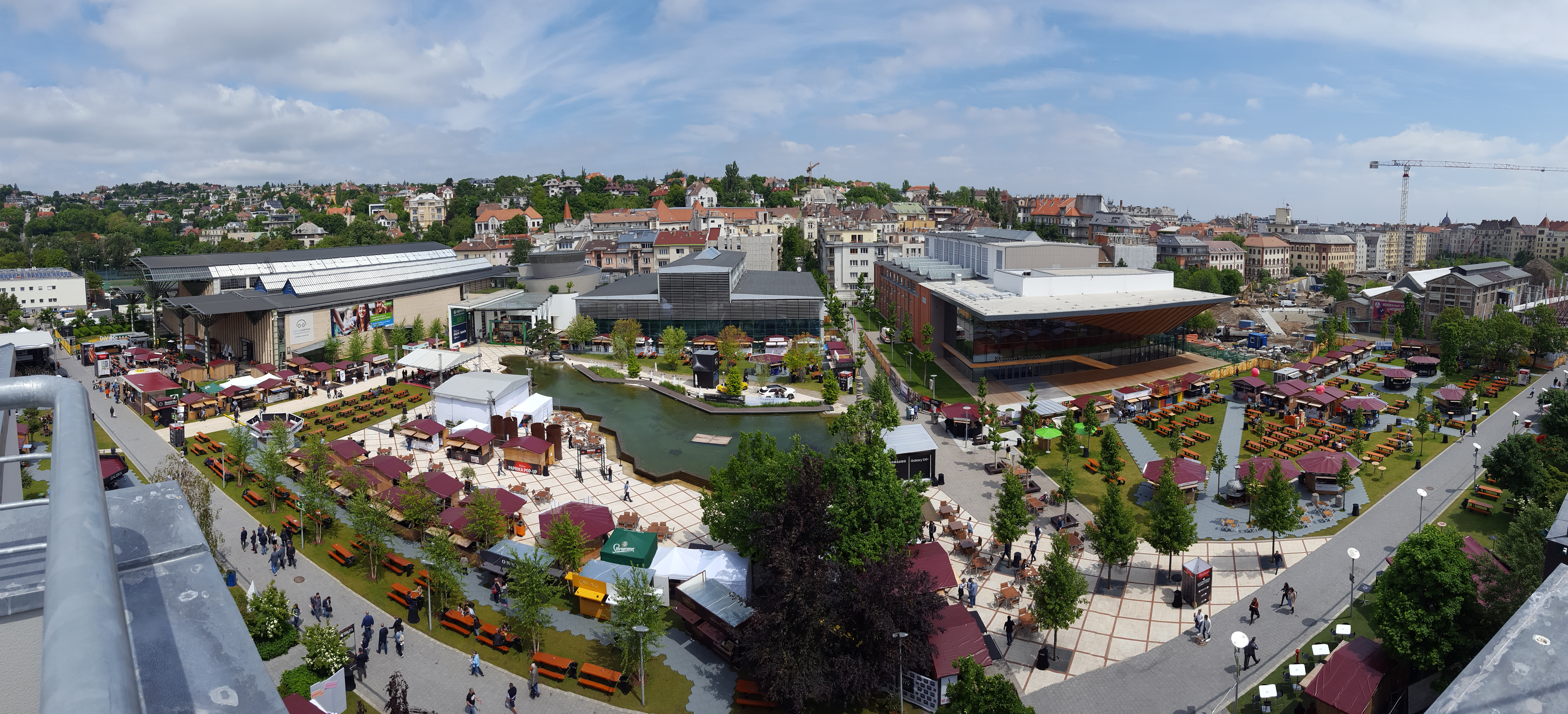 A Millenáris Park